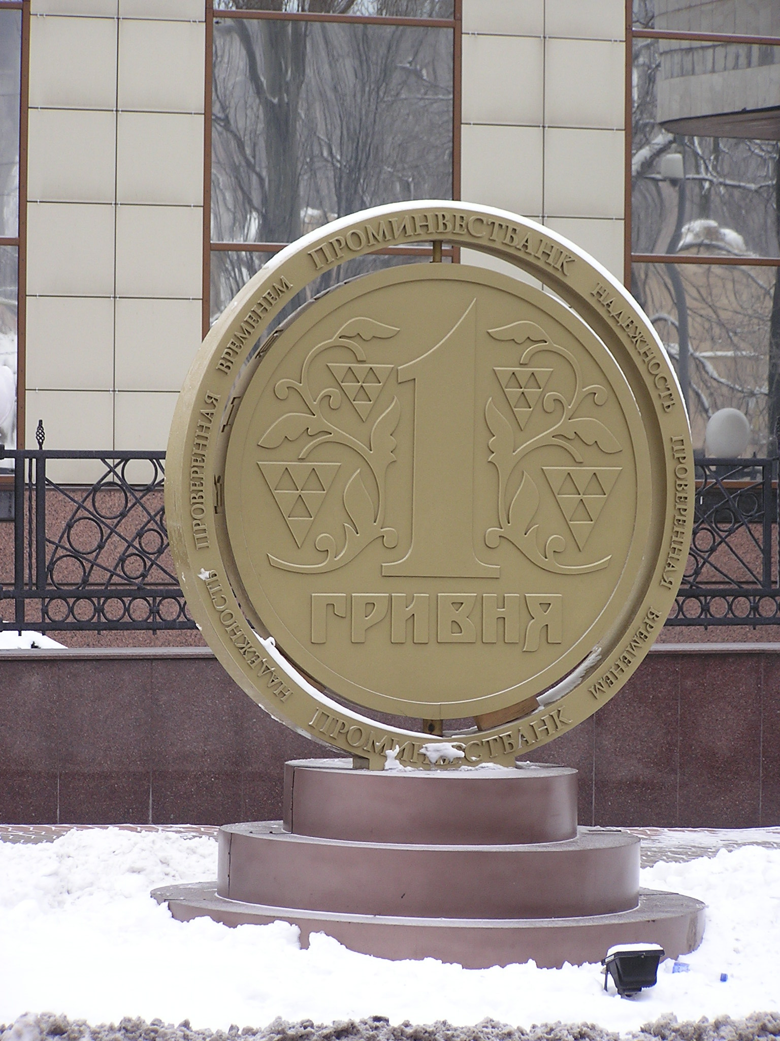 Донецк. Гривна у Проминвестбанка.